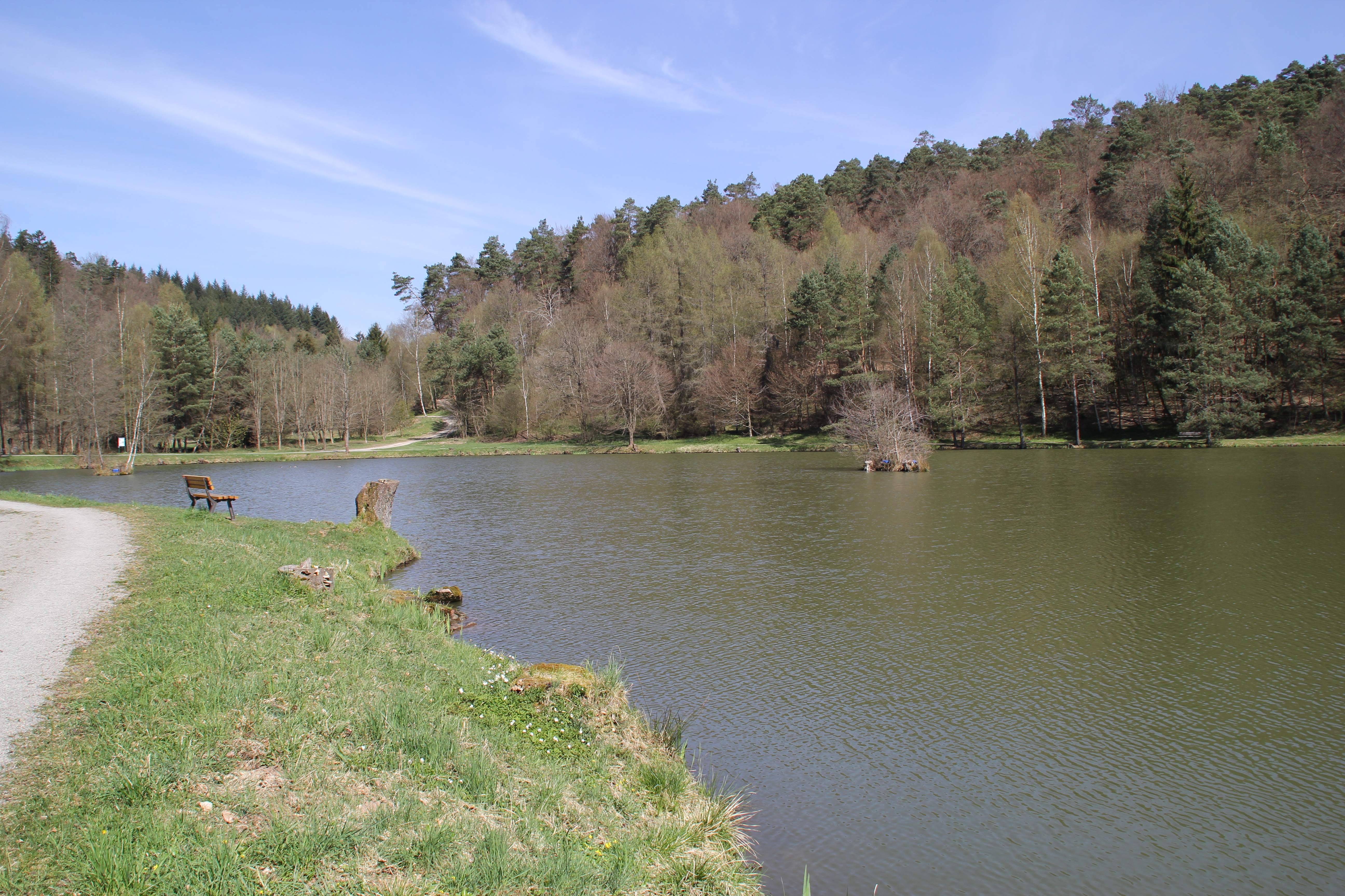 Der nördliche See der Aubachseen (Auseen) bei Habichsthal, Bayern